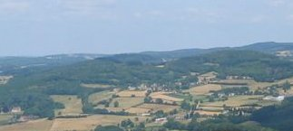 Vue depuis la chapelle du banquet de la commune de Gâcogne dans le département de la Nièvre. On aperçoit dans le coin en bas à gauche le Château de Raffigny. Photo prise en juillet 2005 par Utilisateur:Jgremillot